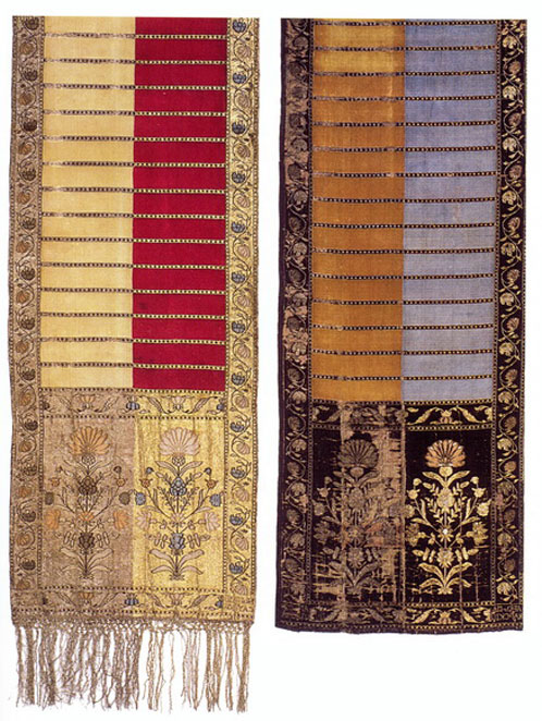 Слуцкие пояса из собраний Литвы